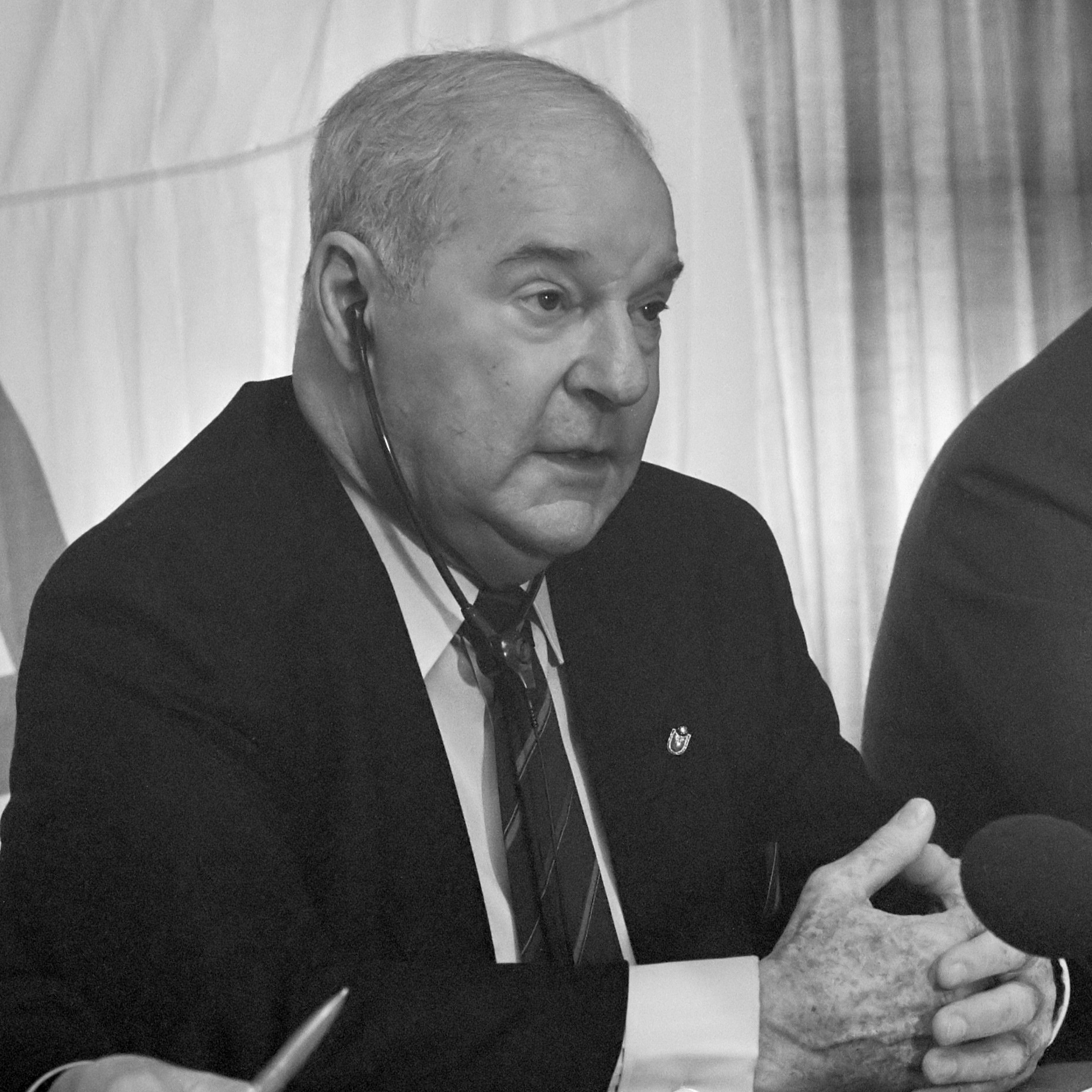 Persconferentie UEFA in Zeist over jeugdvoetbalconferentie J. Georges (l), voorzitter UEFA en Van Marle (r), voorzitter KNVB 11 februari 1987